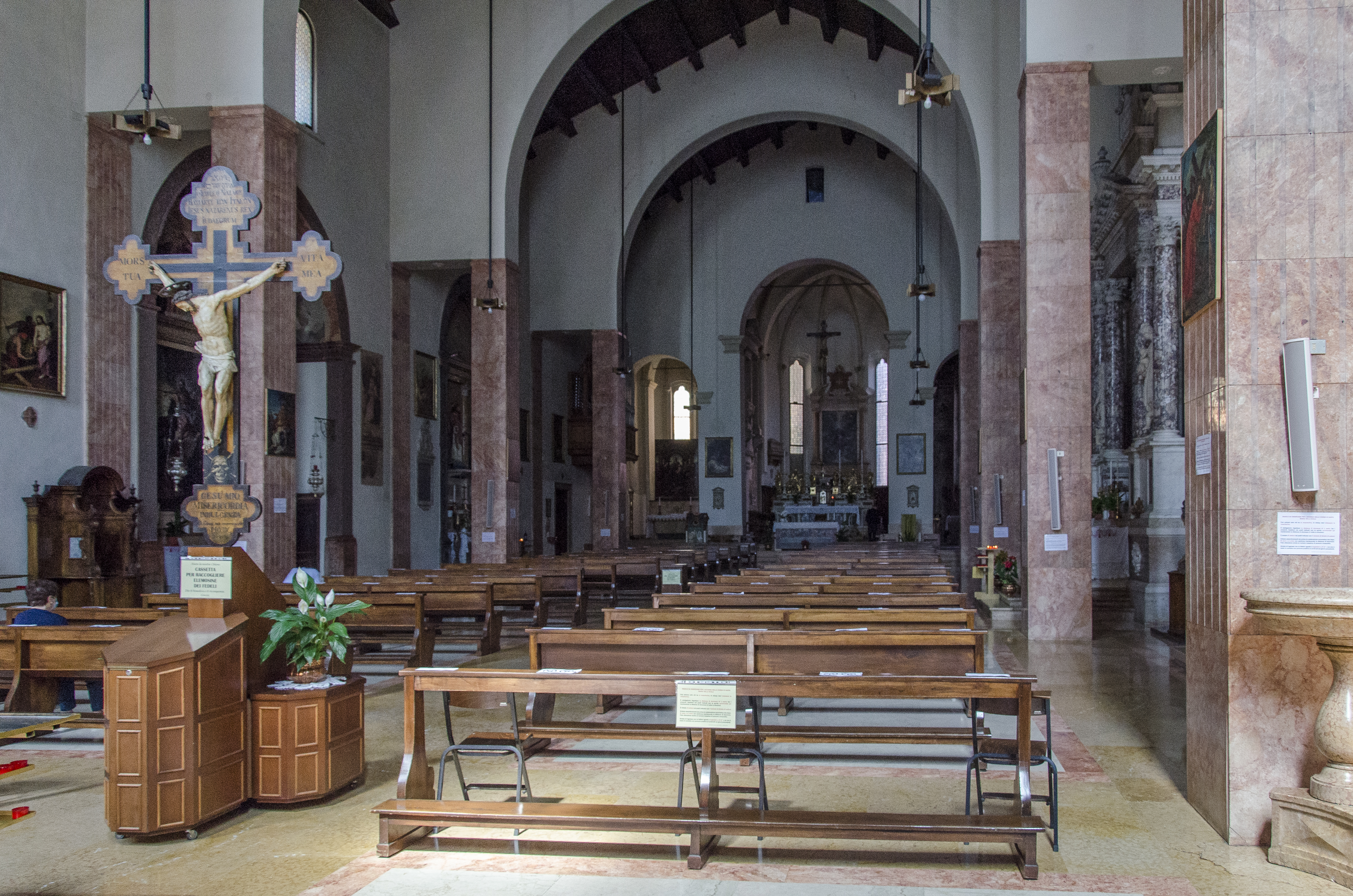 Interno della chiesa di Santa Maria della Scala, a Verona